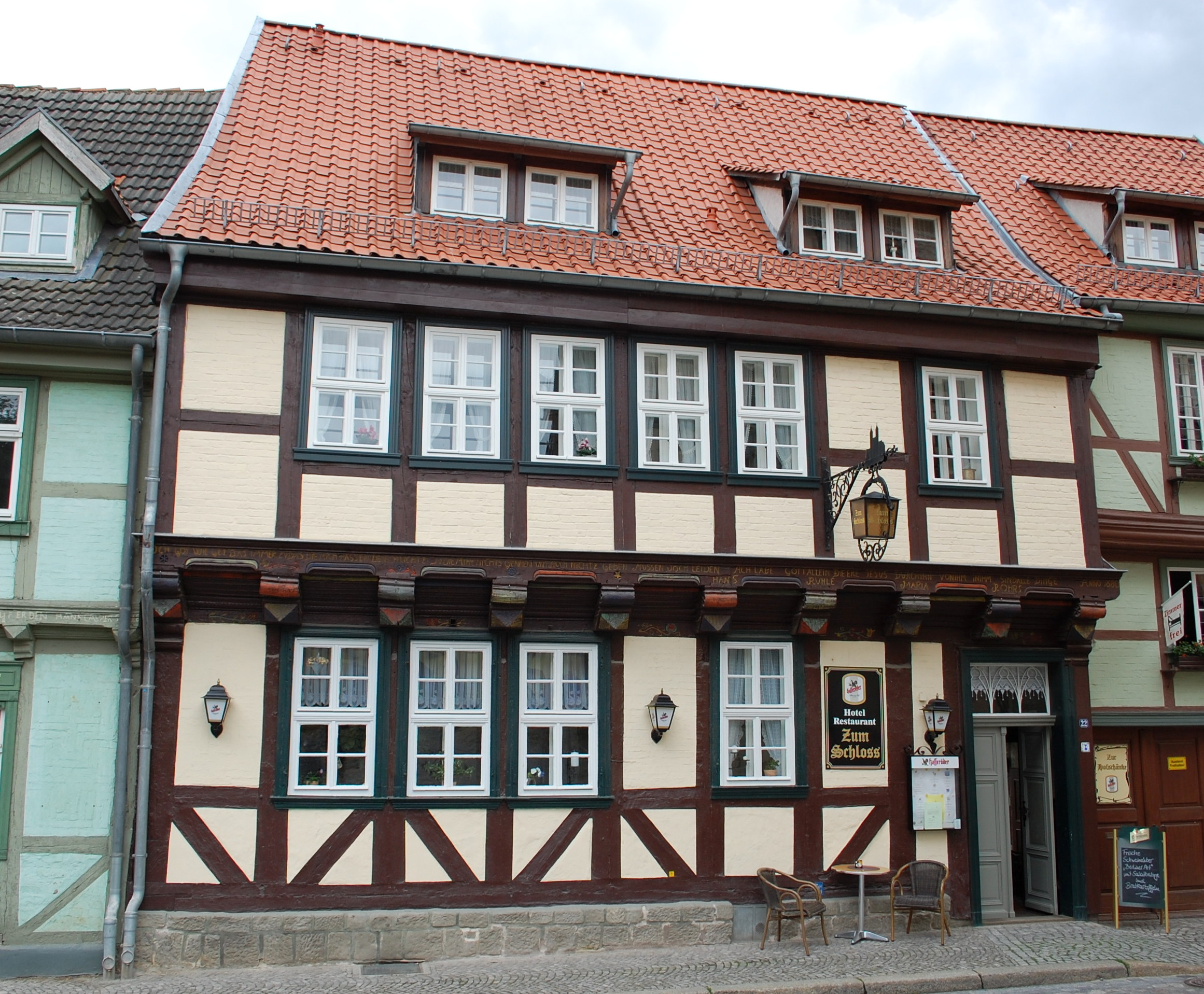 Haus Mühlenstraße 12 in Quedlinburg